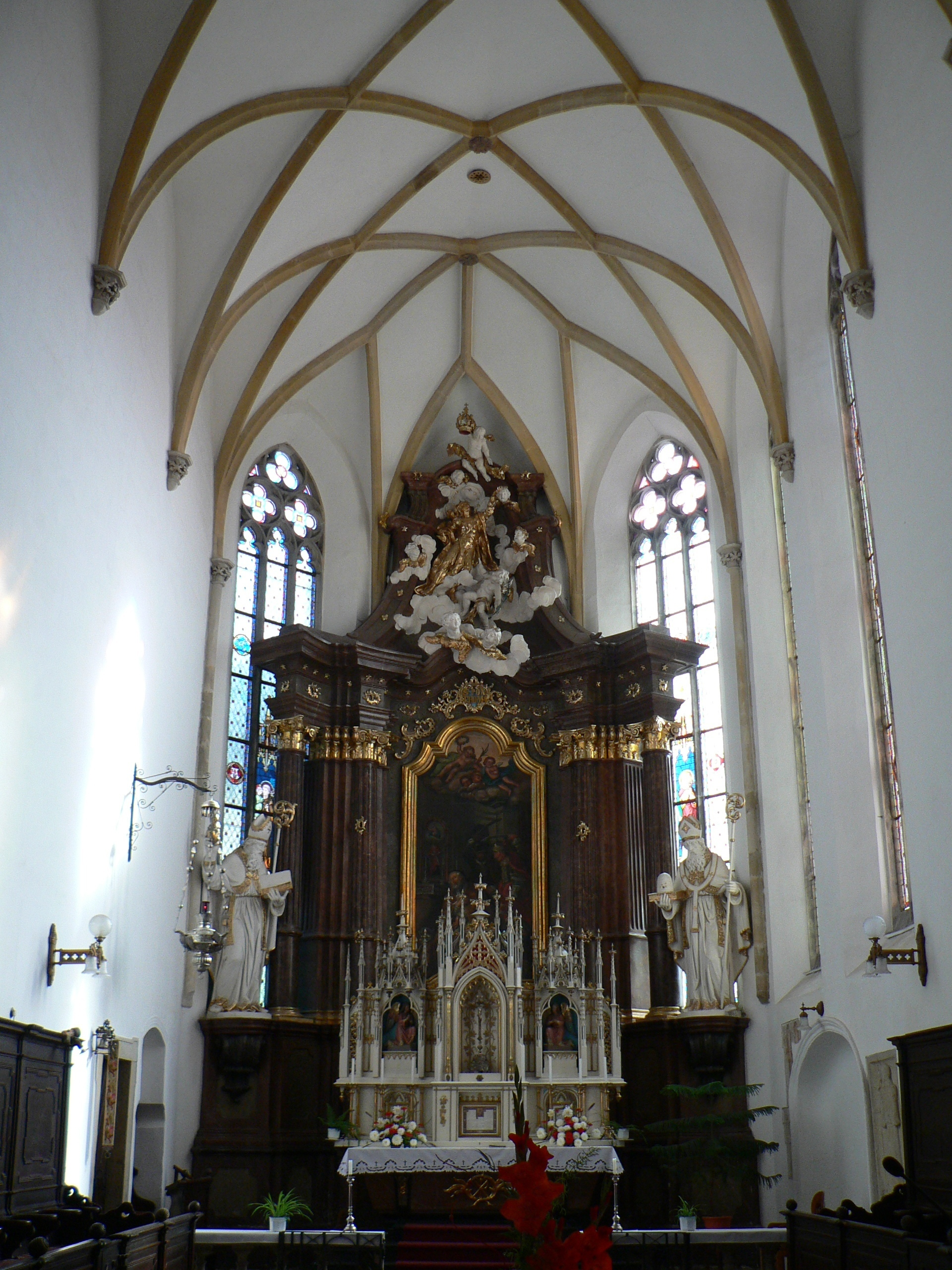 Kostel sv. Tomáše z Canterbury v Mohelnici, hlavní oltář